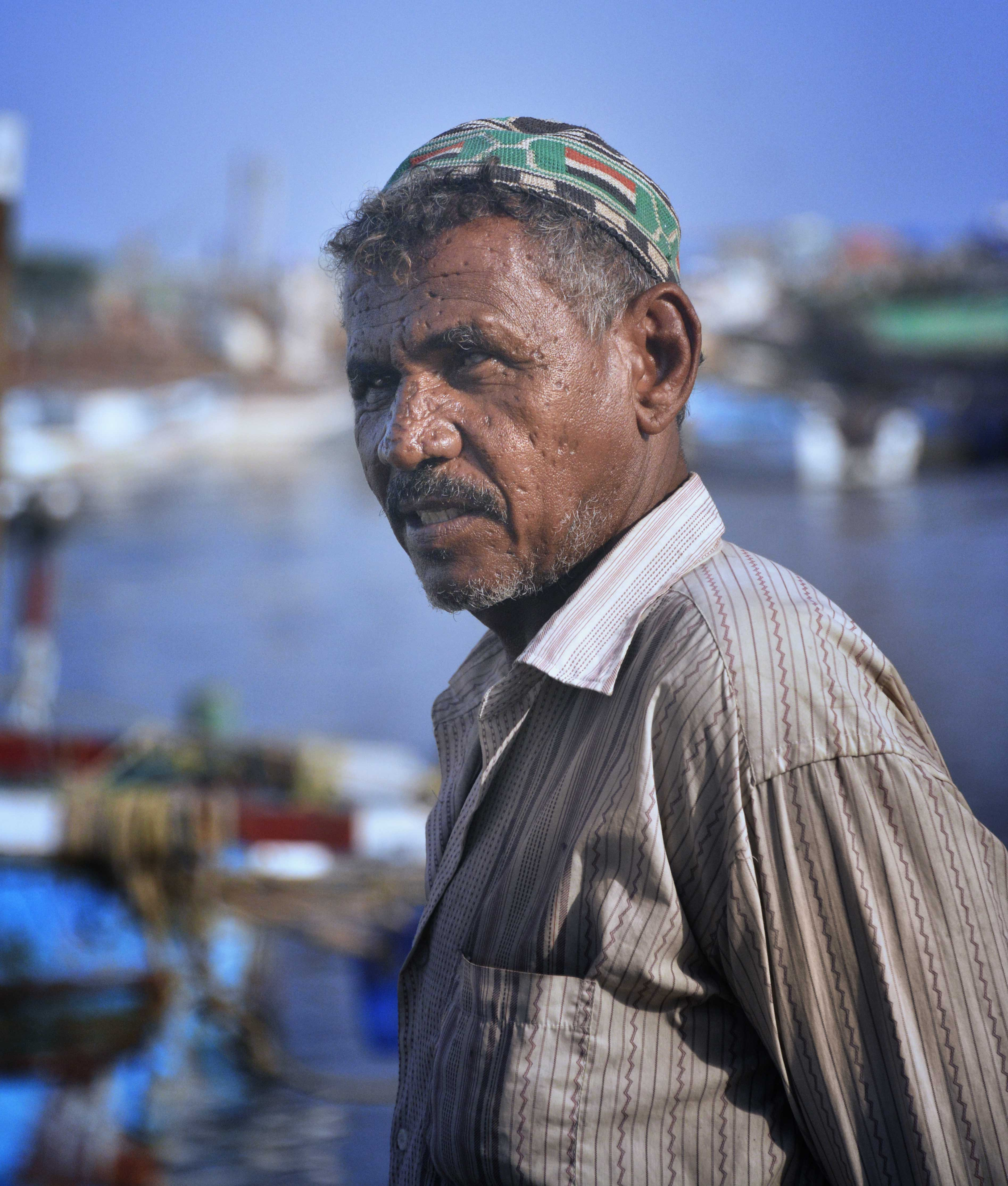 Seafarer, Yemen